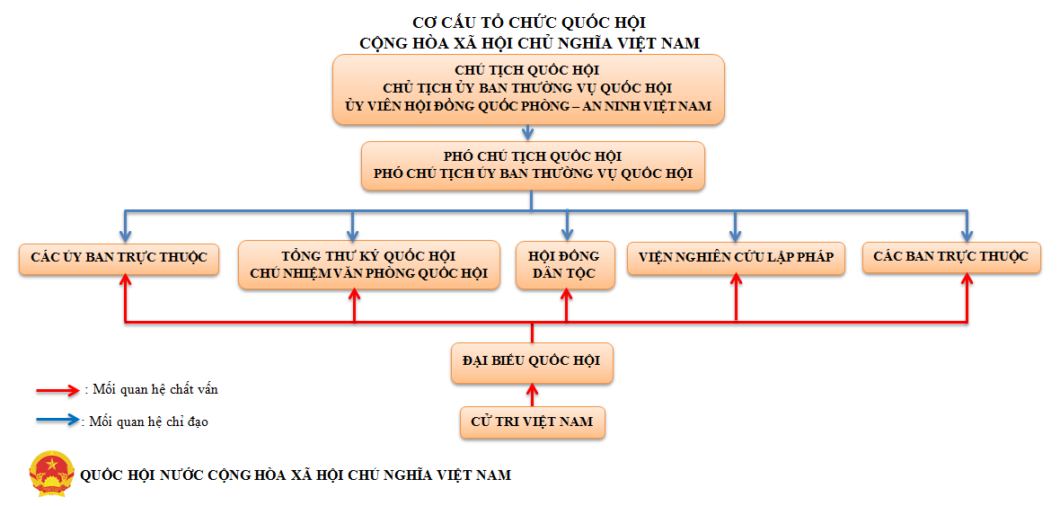 Cơ cấu tổ chức Quốc hội Cộng hòa xã hội chủ nghĩa Việt Nam